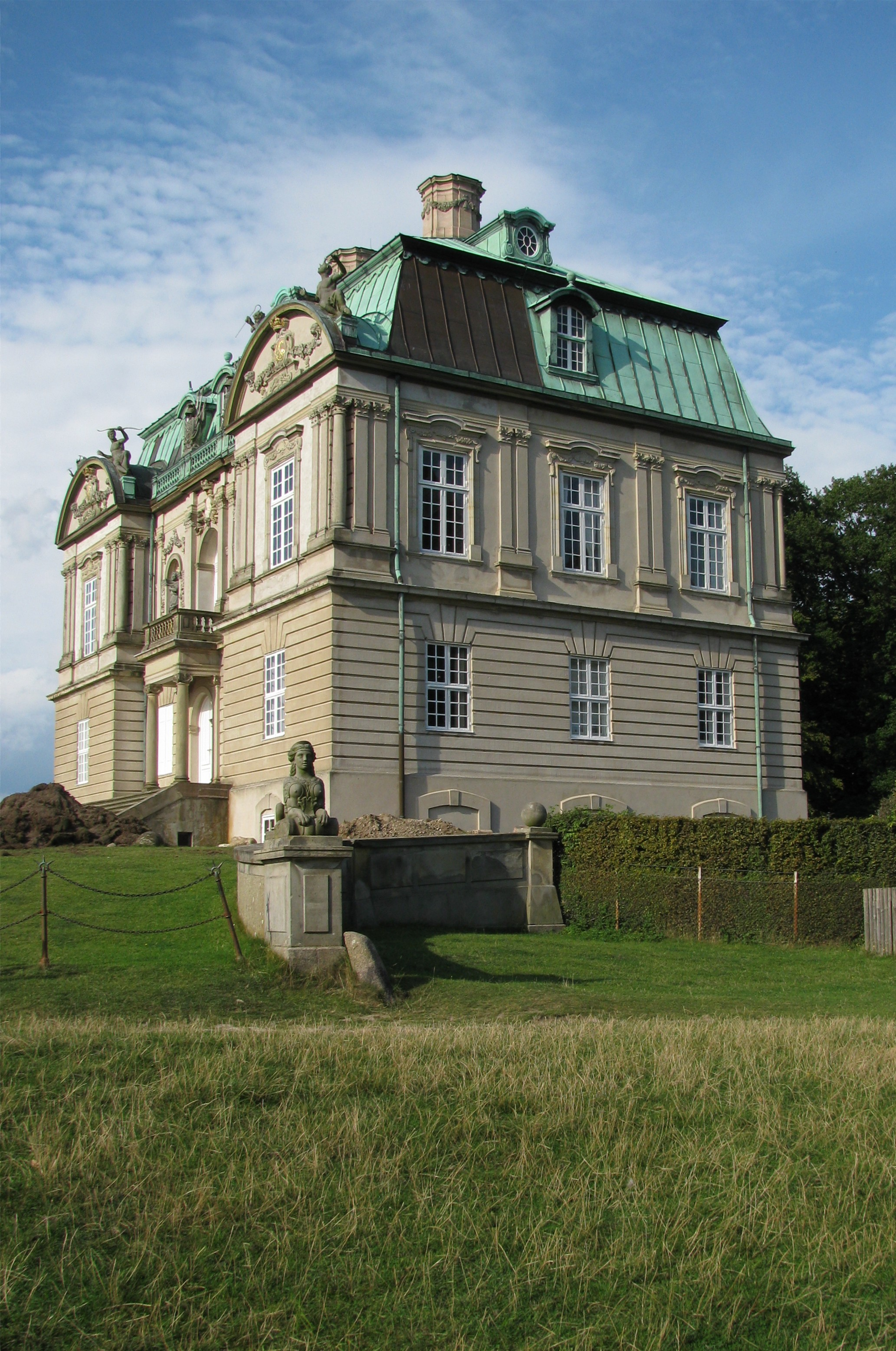 Eremitageslottet